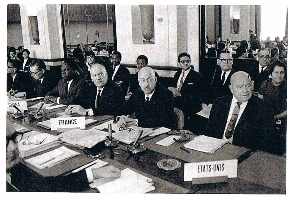 Travail personnel